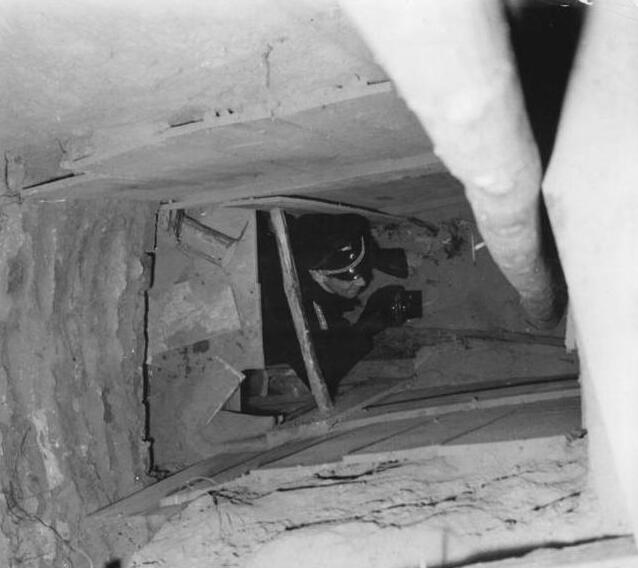 Zentralbild-Junge-1.2.1962 Gefährliche Provokation an der Staatsgrenze der DDR-Durch Agentenschleuse Eisenbahnverkehr aufs äusserste gefährdet. Ein neues eklatantes Beispiel für die friedensgefährdende Rolle der Westberliner Frontstadt-Politik ist am 1.2.1962 auf einer internationalen Pressekonferenz in Berlin enthüllt worden. Vor in- und ausländischen Journalisten, darunter Vertretern westdeutscher Zeitungen informierte der Minister für Verkehrswesen der DDR, Erwin Kramer, auf dem Gelände des S-Bahnhofes Wollankestrasse über die ungeheuerliche Tatsache, dass Westberliner Banditen unter gröbster Verletzung der Staatsgrenze der DDR durch die Gewölbe dieses Bahnhofes ein Stollensystem vorgetrieben haben. Durch die Anlage dieses Stollensystems sollten Agenten und Diversanten von Westberlin in das Gebiet der DDR eingeschleust werden. UBz: Blick in den Stollen.